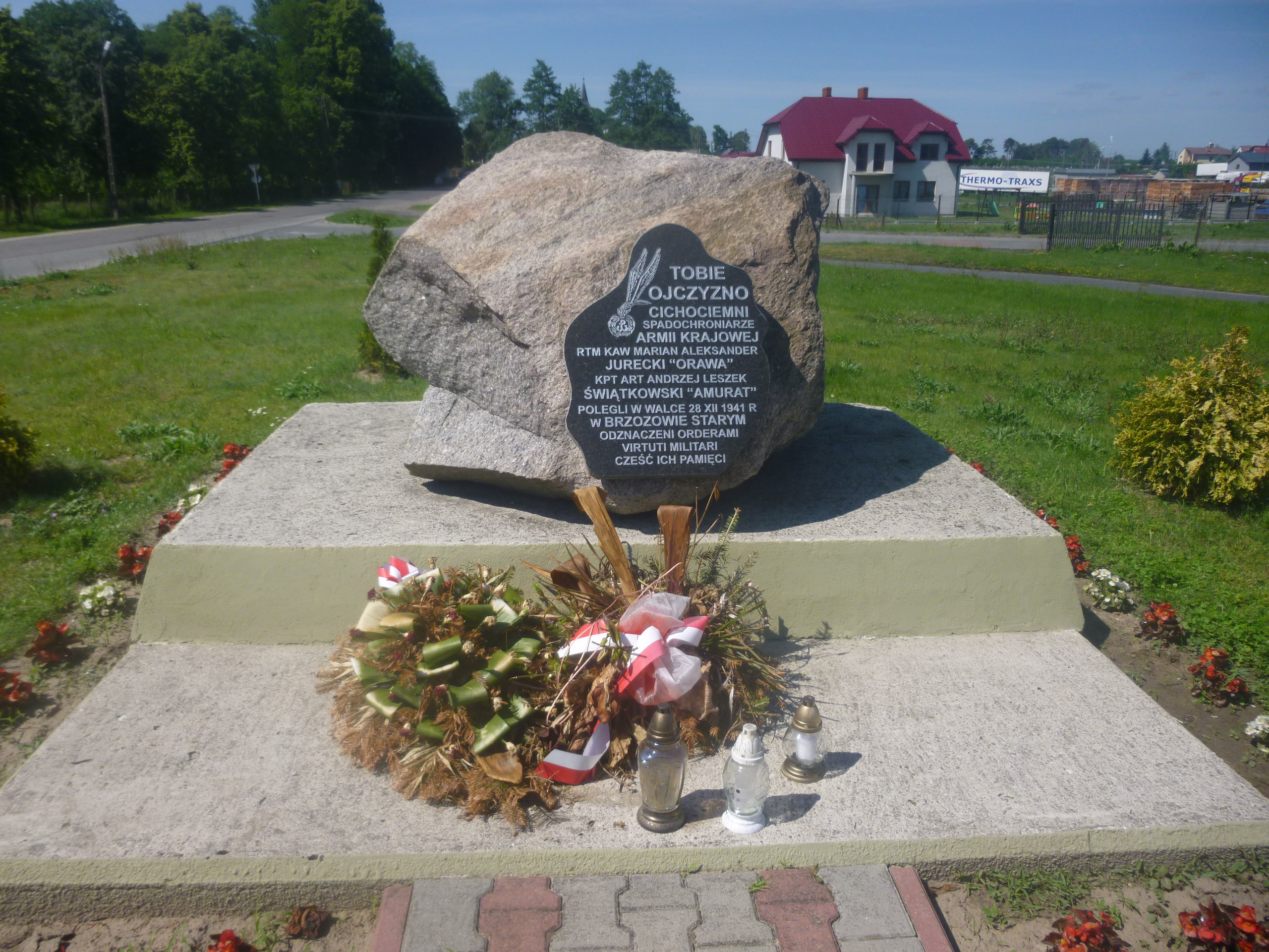 Pomnik w Brzozowie Starym upamiętniający cichociemnych poległych w walce w grudniu 1941 roku na terenie wsi